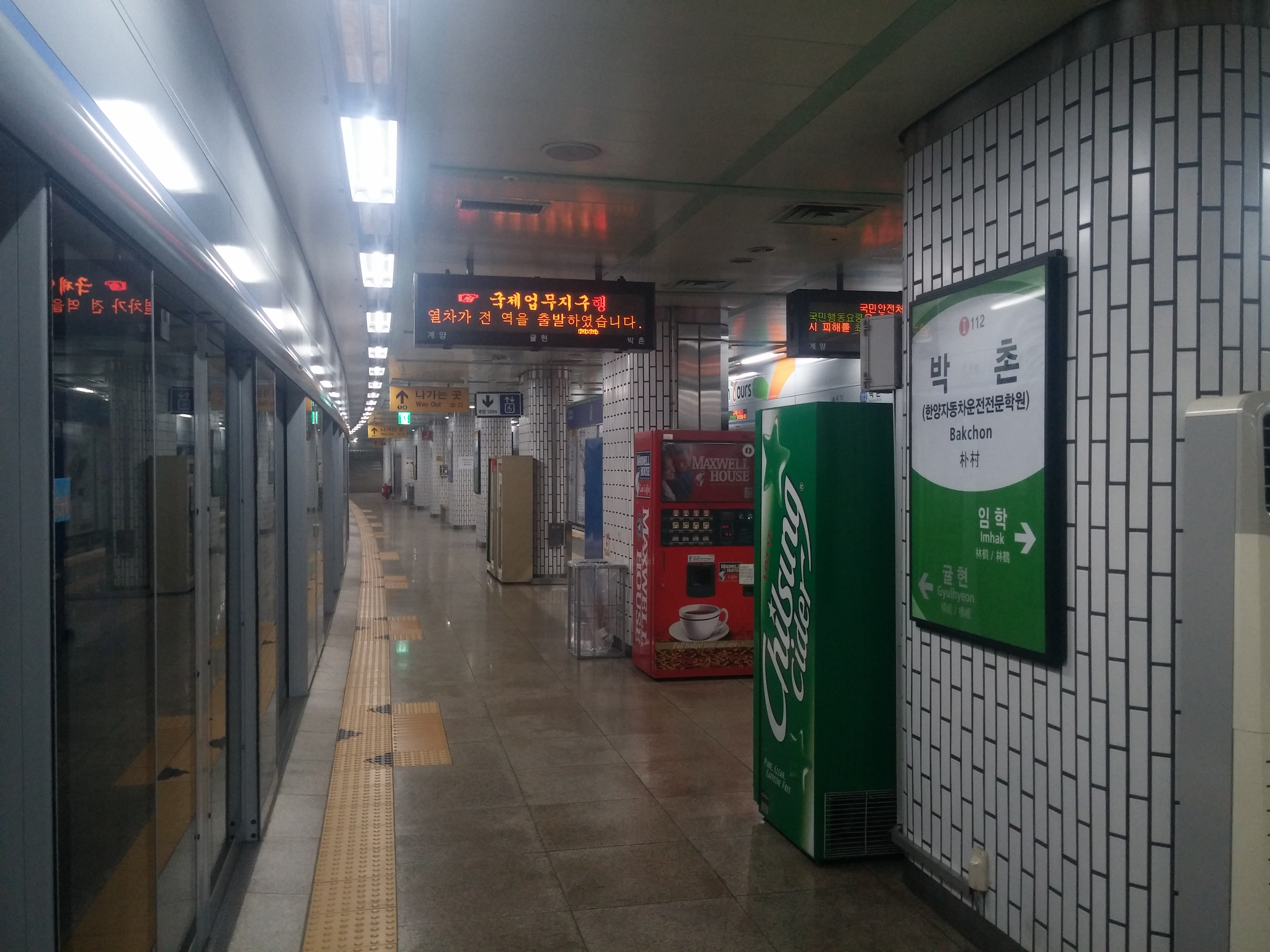 박촌역 승강장(국제업무지구 방면)